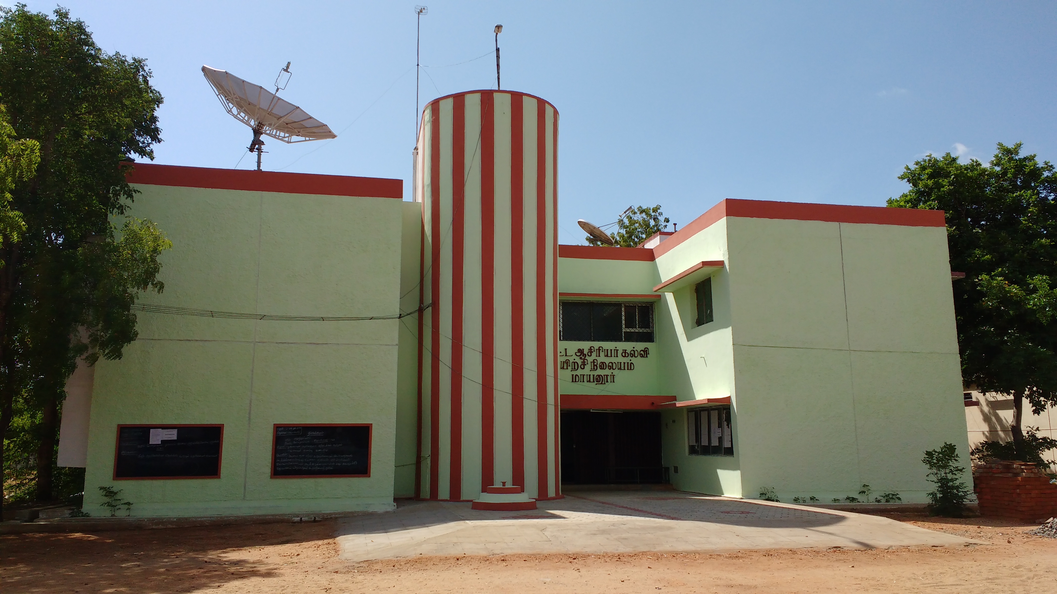 கரூர் மாவட்ட ஆசிரியர் கல்வி மற்றும் பயிற்சி நிறுவனத்தின் முகப்புத் தோற்றம். மாயனூர்